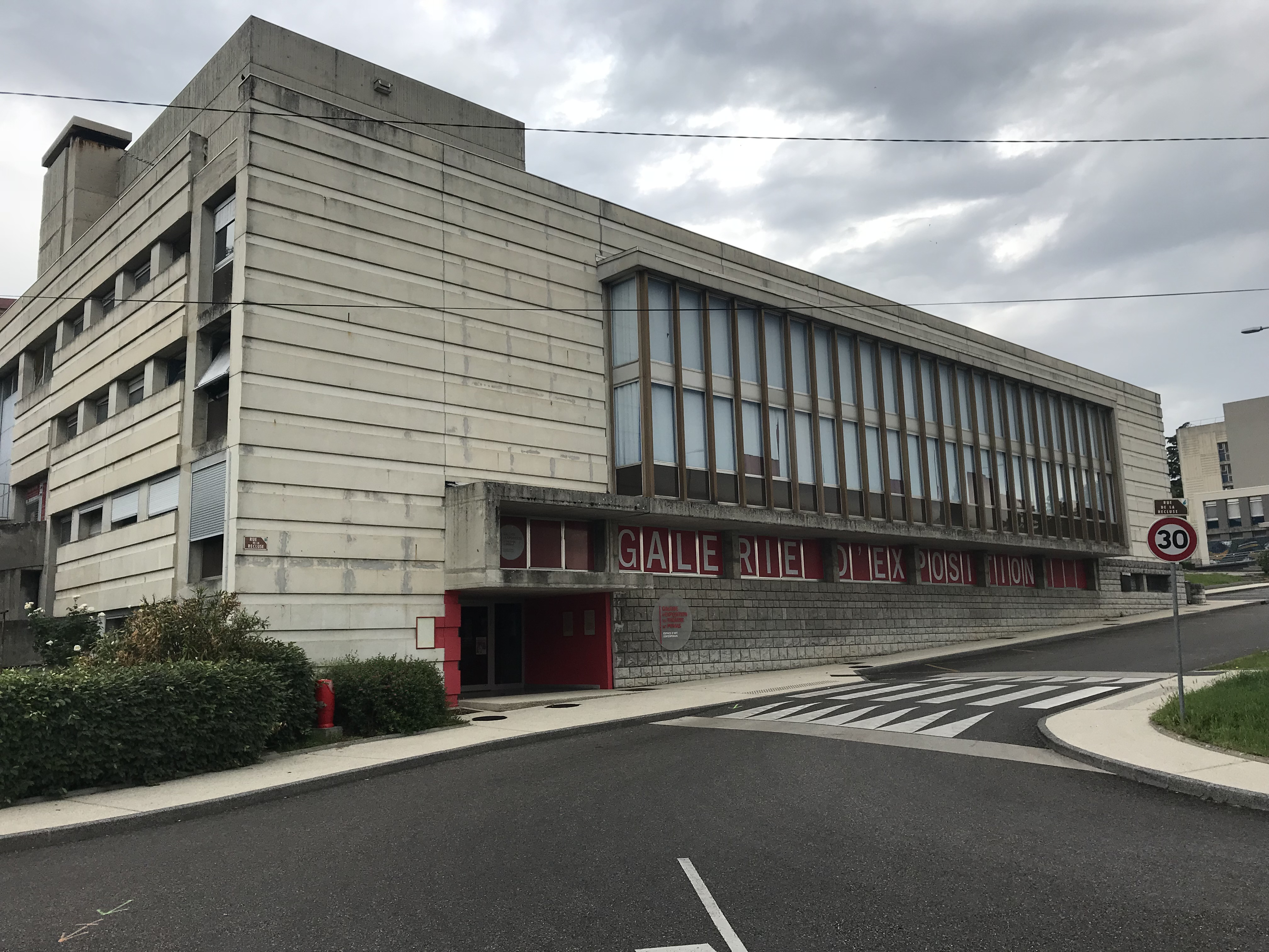 Image de Privas en Ardèche en France.